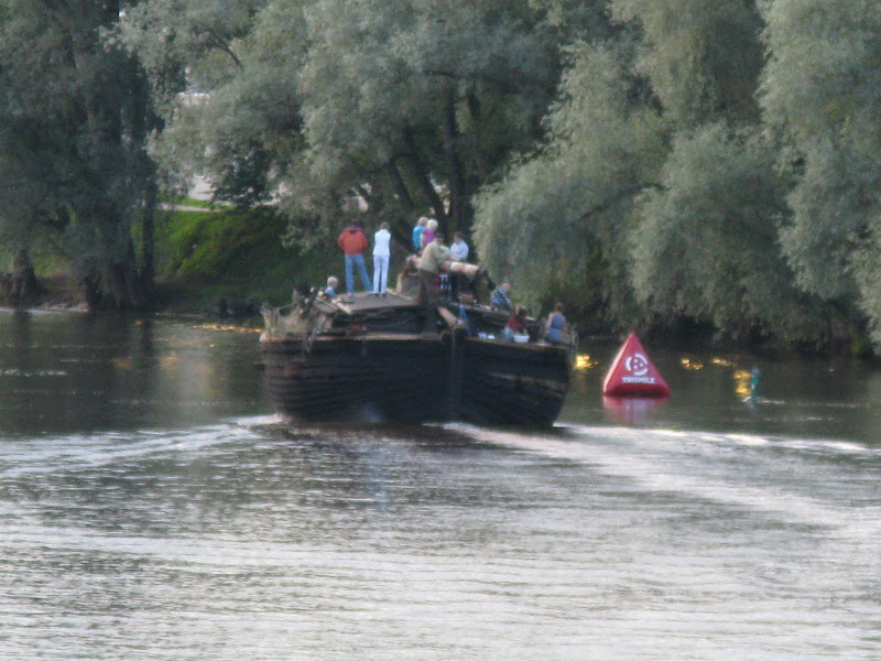 Lodi Jõmmu Emajõel Tartu hansapäevadel, 15. august 2012. Foto: Oop.